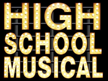 Logo original du téléfilm المدونة التعليمية للرياضيات : Premiers Pas sur scène, premier volet de la trilogie المدونة التعليمية للرياضيات.